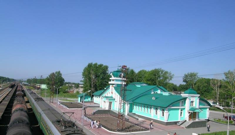 Железнодорожный вокзал в п. Мошково